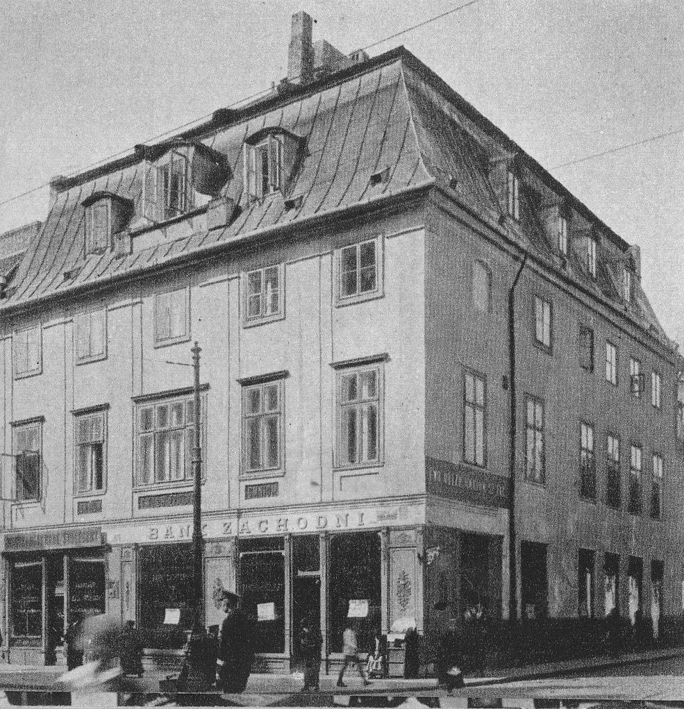 Pałacyk Sanguszków ul. Nowy Świat 51 róg Warecka 1 w Warszawie